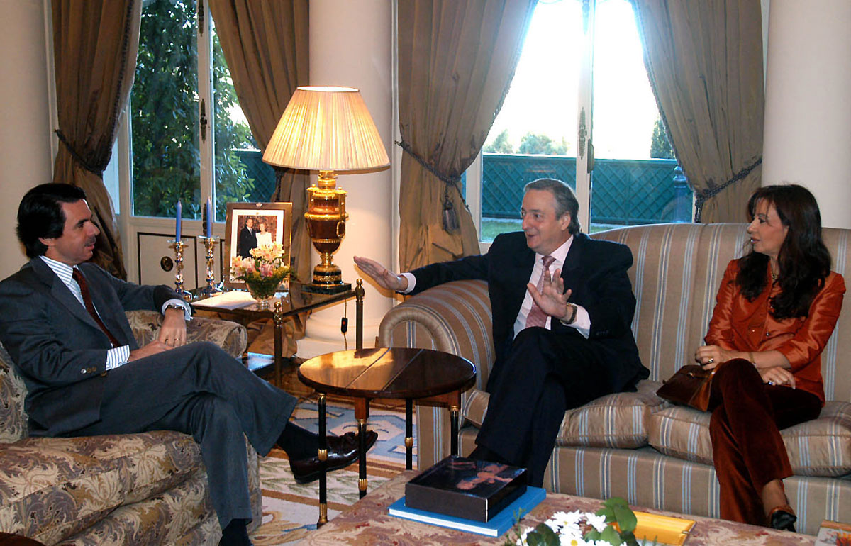 España, Madrid - El presidente Néstor Kirchner y su esposa junto al presidente español, José María Aznar.